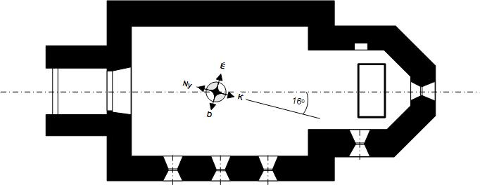 A veleméri keletelt templom sematikus alaprajza